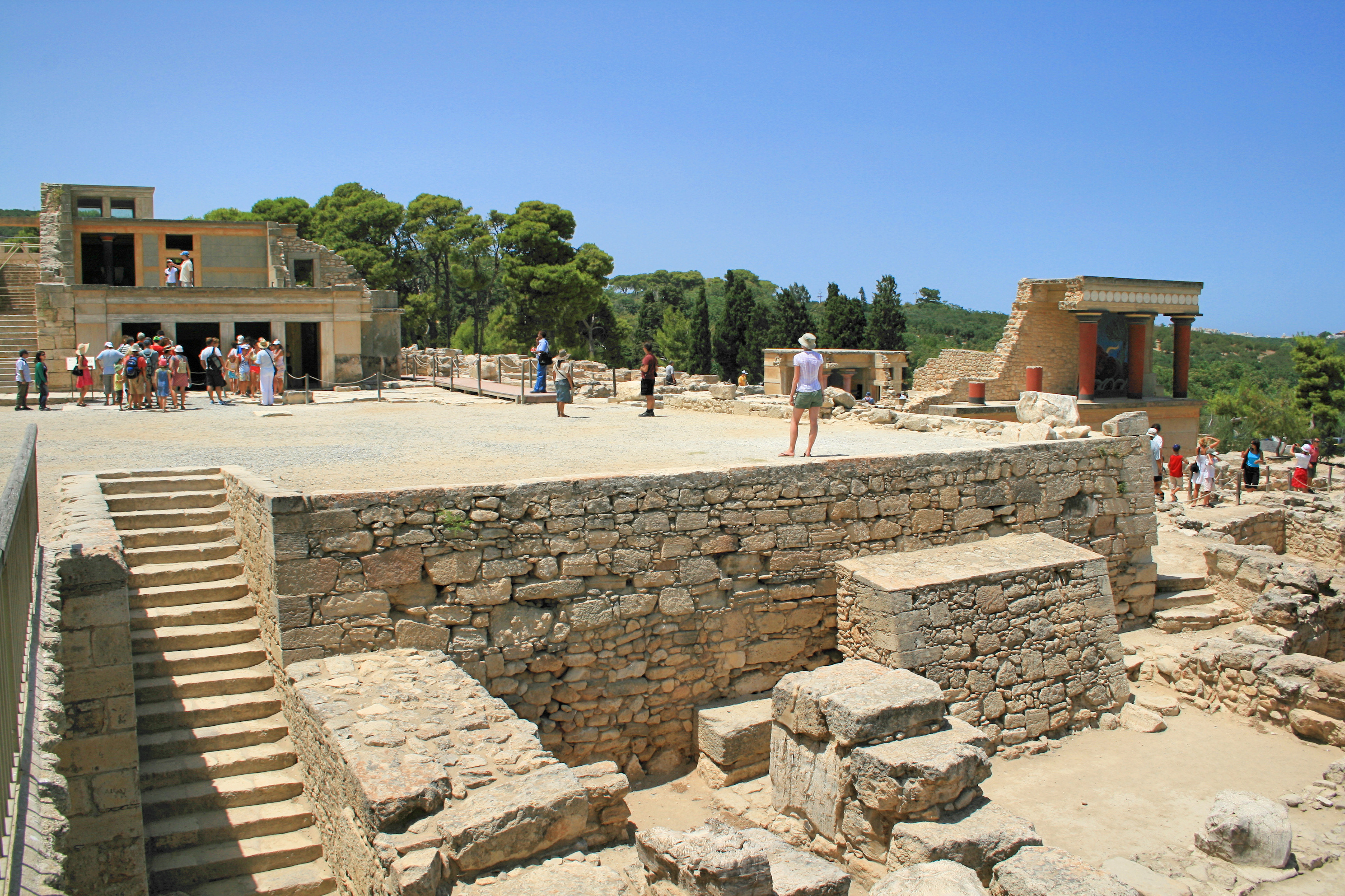 Blick über den Zentralhof des minoischen Palastes von Knossos auf der griechischen Insel Kreta (links der Eingang zum Thronsaal und rechts das teilweise wiederhergestellte westliche Säulenvestibül des Korridors des Nordeingangs mit dem Relieffresko des Stiers)